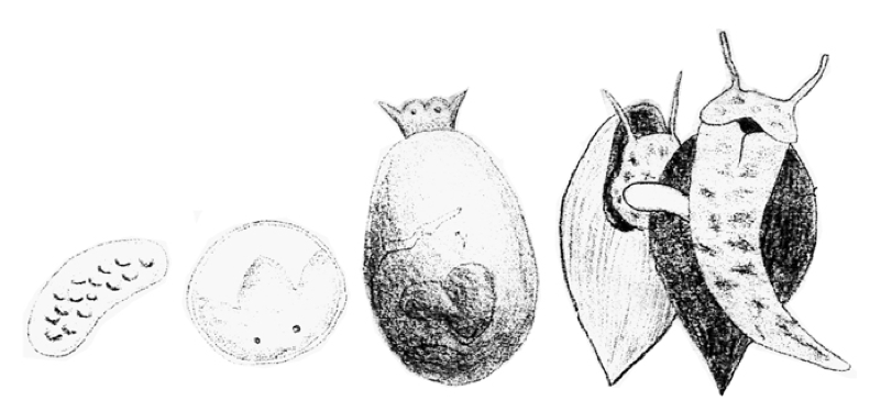 Se ilustran los 4 estadíos del ciclo de vida de Mayabina pliculosa.